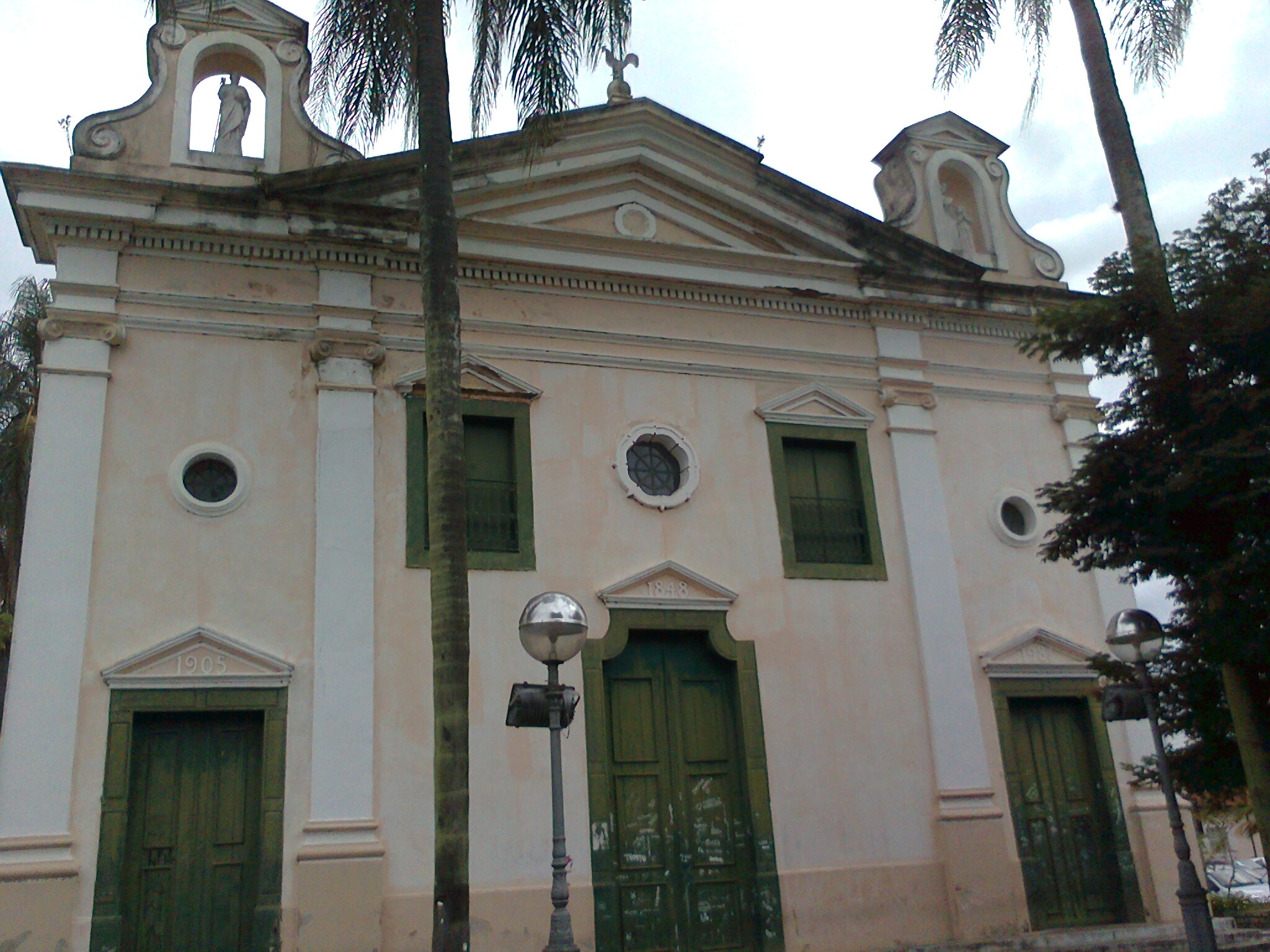 Igreja de São José em Pindamonhangaba - São Paulo - Brasil, construída em 1848